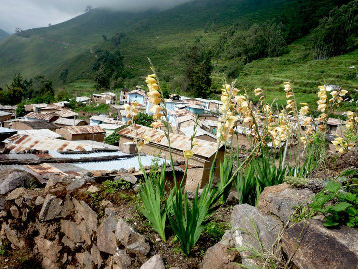 Pueblo de Pasac-Huaral